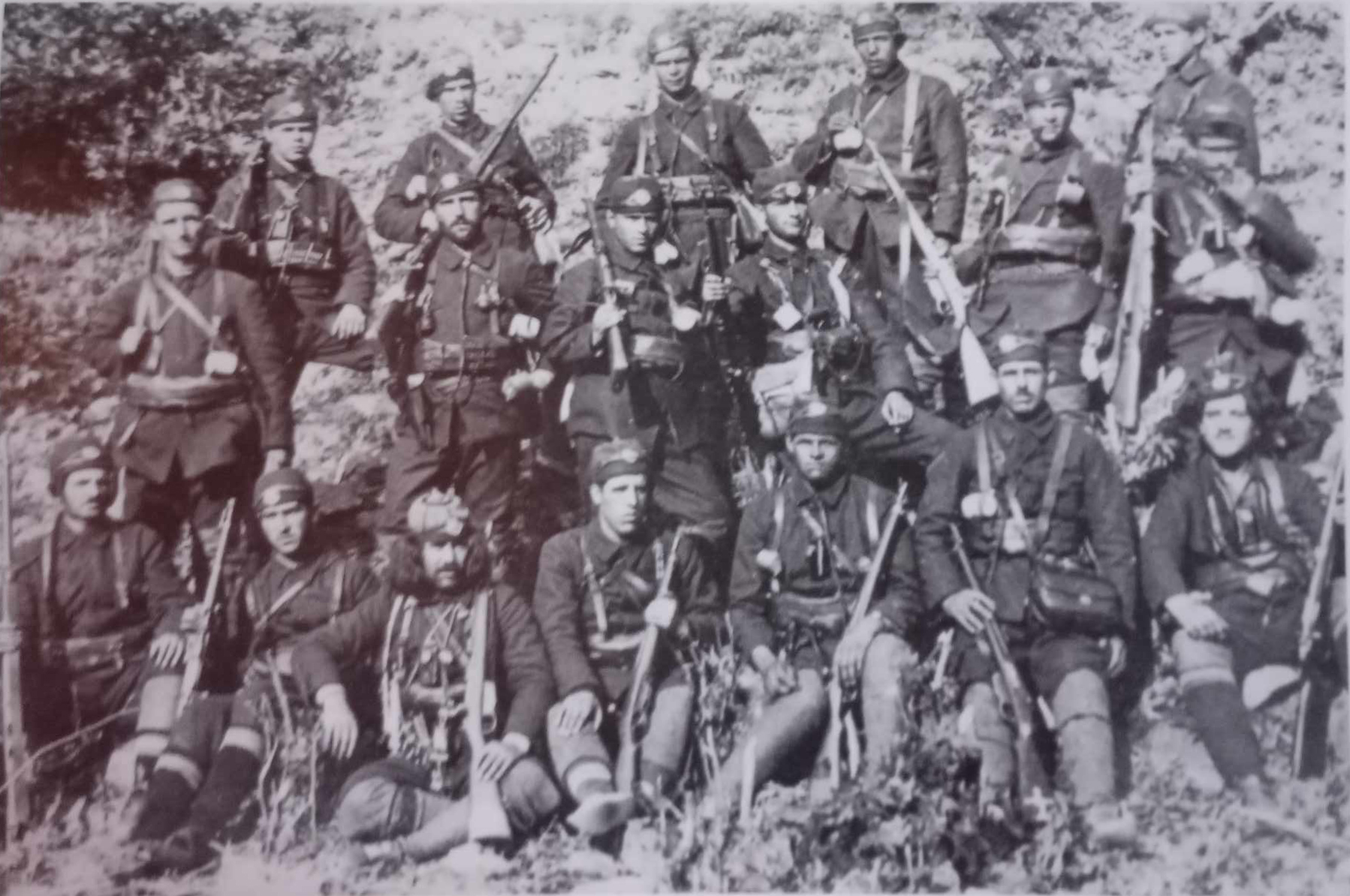 IMRO band